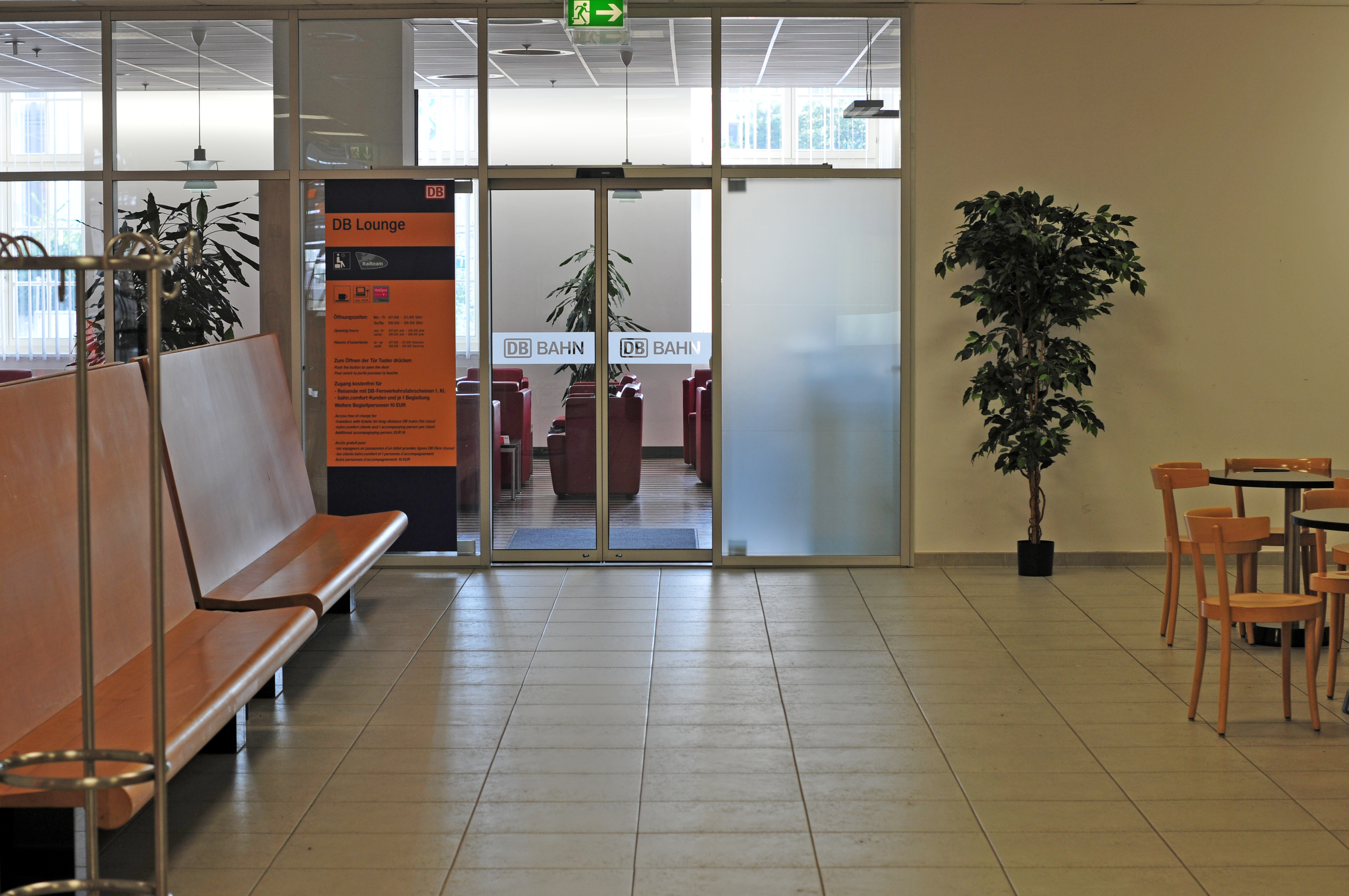 Leipzig, Deutschland